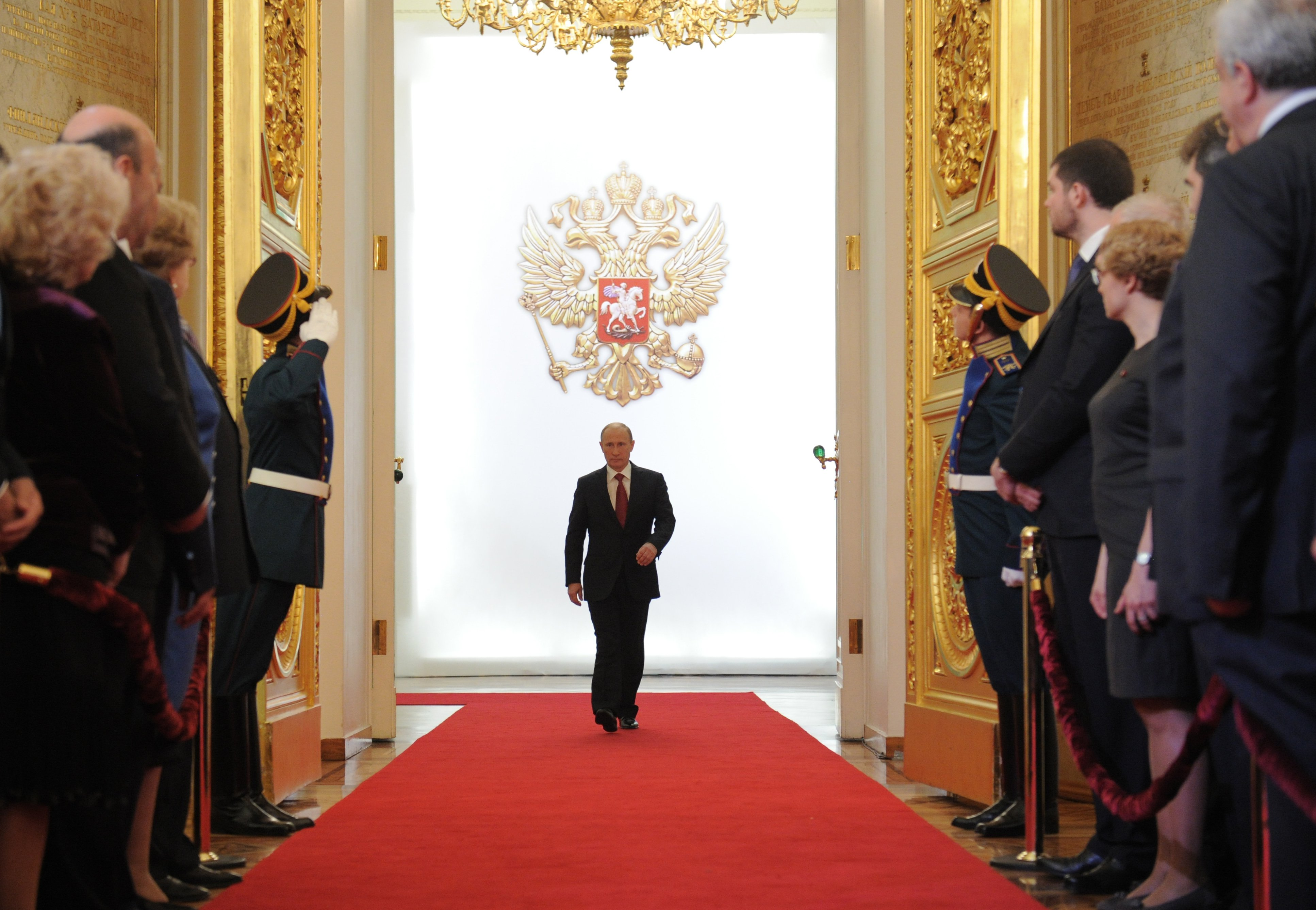 La ceremonia de inauguración de Vladímir Putin como Presidente de Rusia.